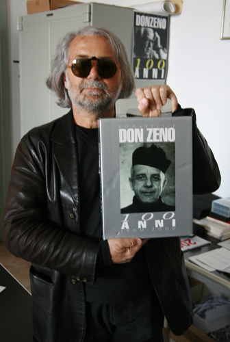 Beppe Lopetrone e la sua opera libraria